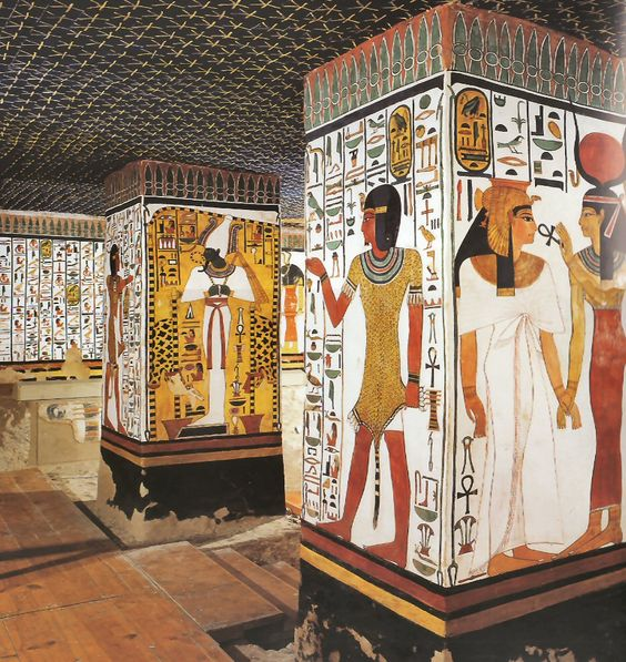 Tomba della regina Nefertari